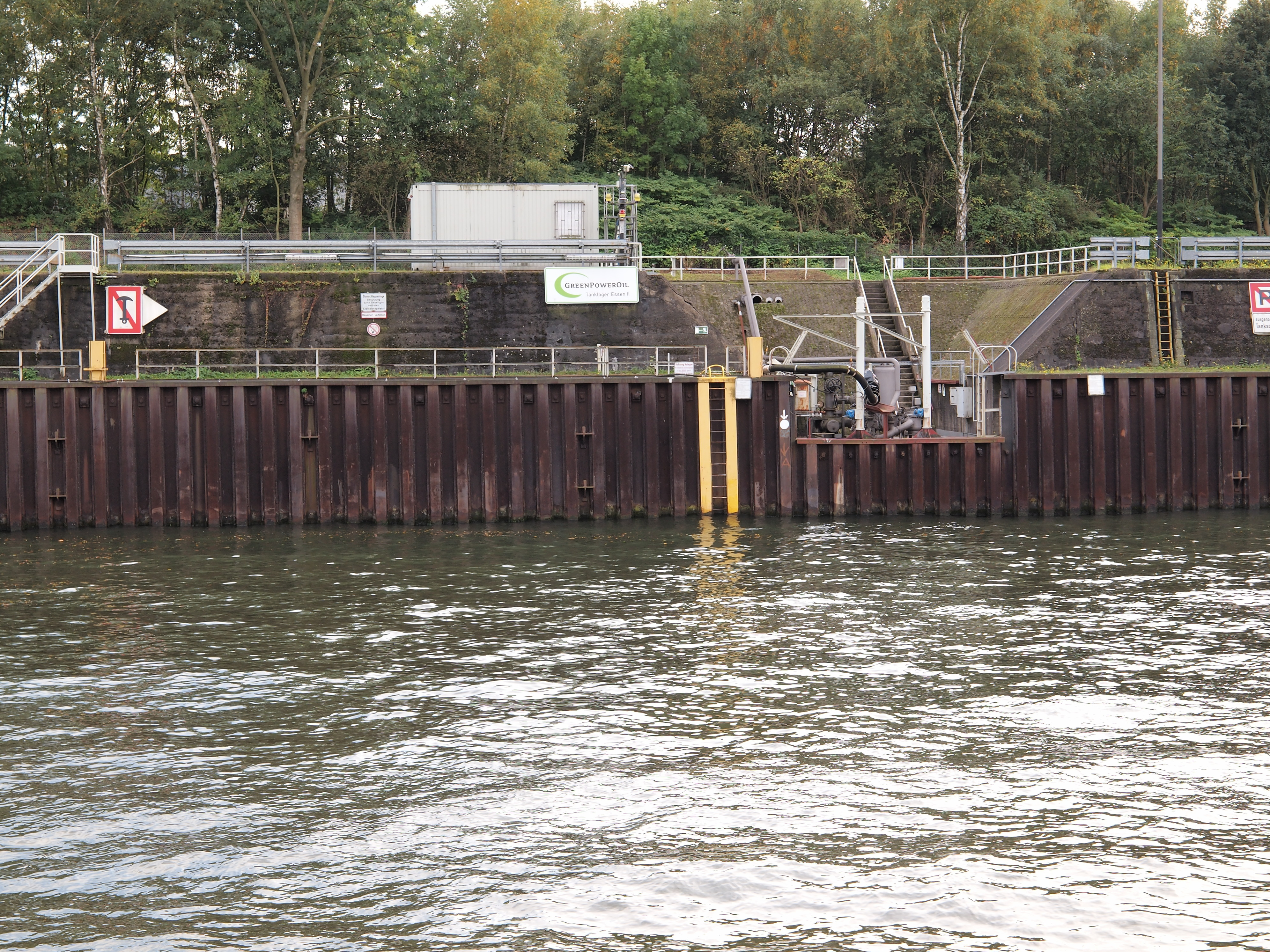 Ölhafen König Wilhelm am Rhein-Herne-Kanal in Essen, Kanalkilometer 14,35-14,68, Nutzung durch die Green Power Oil, einem Hersteller und Vermarkter von Pflanzenölen und Neben- und Folgeprodukten mit einem Tanklager unmittelbar südlich der Hafenanlagen